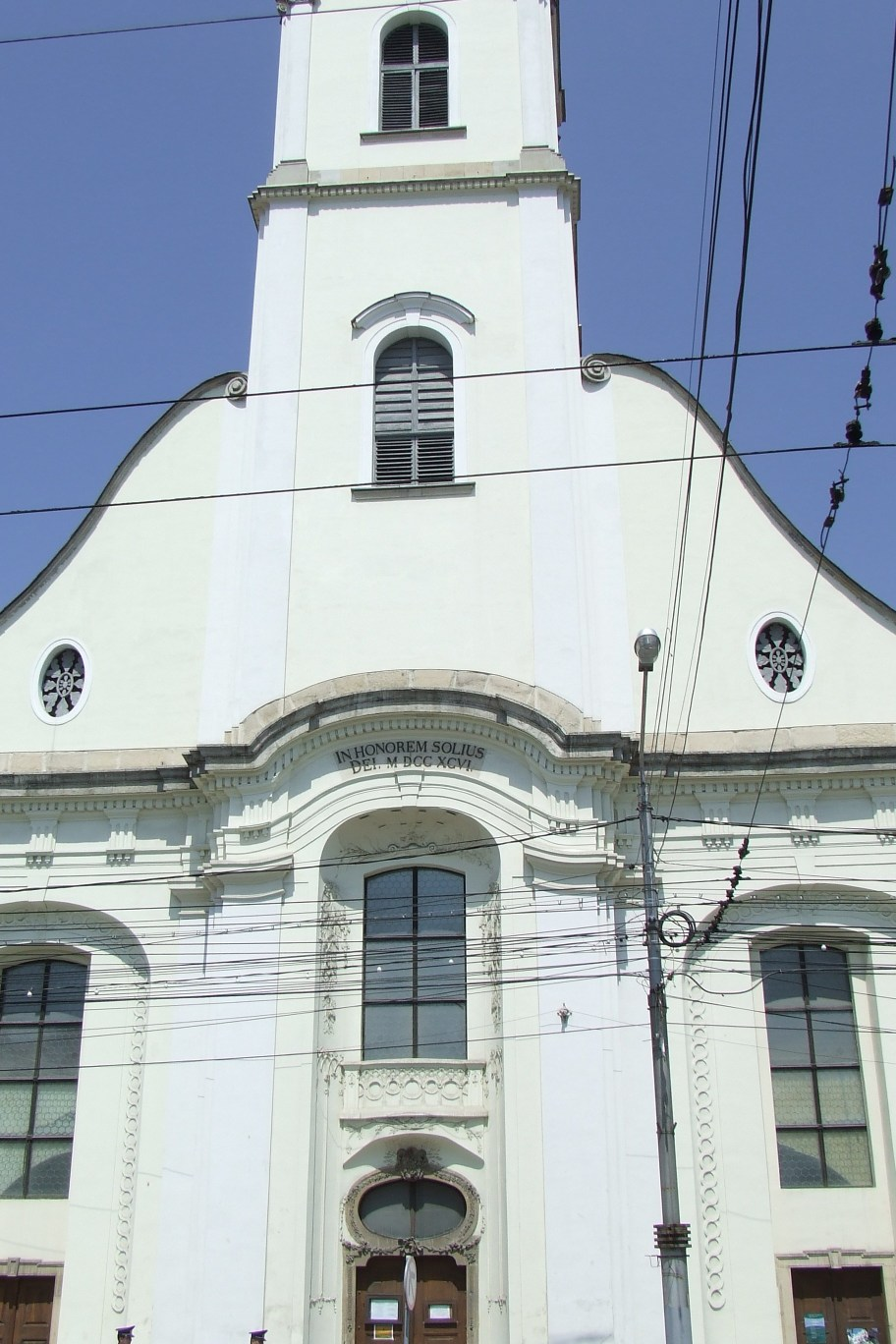 Cluj-Napoca Unitarian Church, Romania